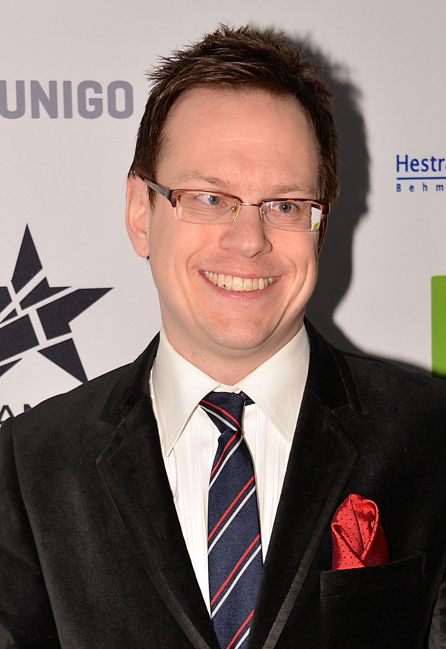 Thomas Deutgen på Grammisgalan på Cirkus, Stockholm den 20 februari 2013.